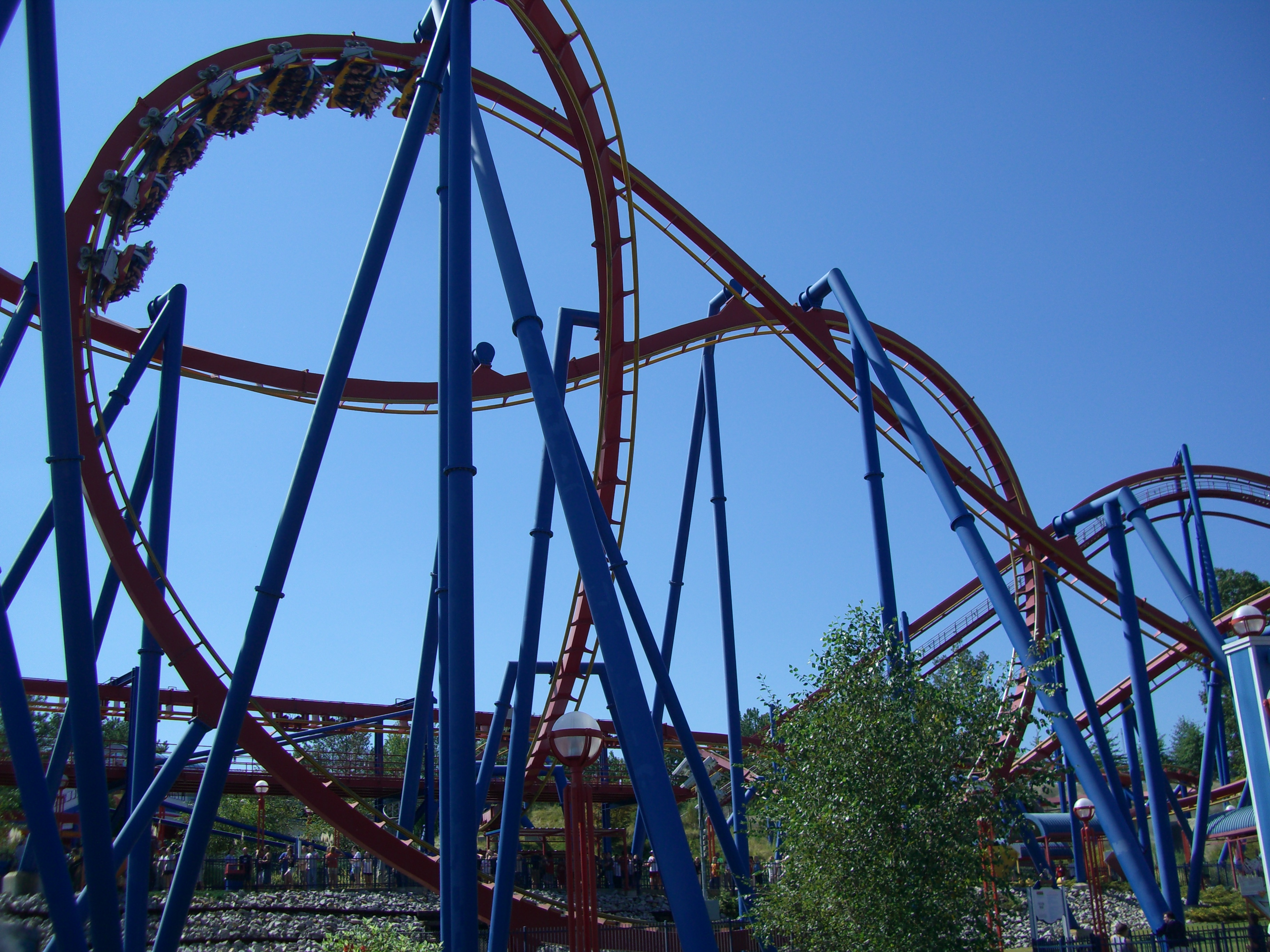 Superman - Ultimate Flight , montagnes russes à Six Flags Over Georgia